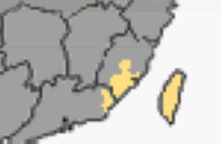 China-Fujian&Taiwan